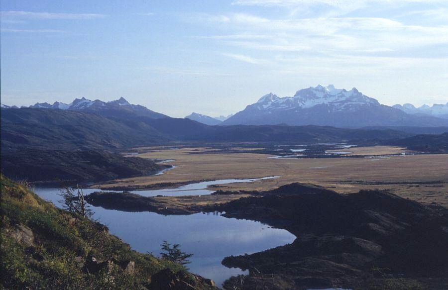 Chile, Sur Grande (= Großer Süden), Región XII de Magellanes y de la Antártica Chilena: Parque Nacional Torres del Paine, Lago del Toro, Monte Balmaceda